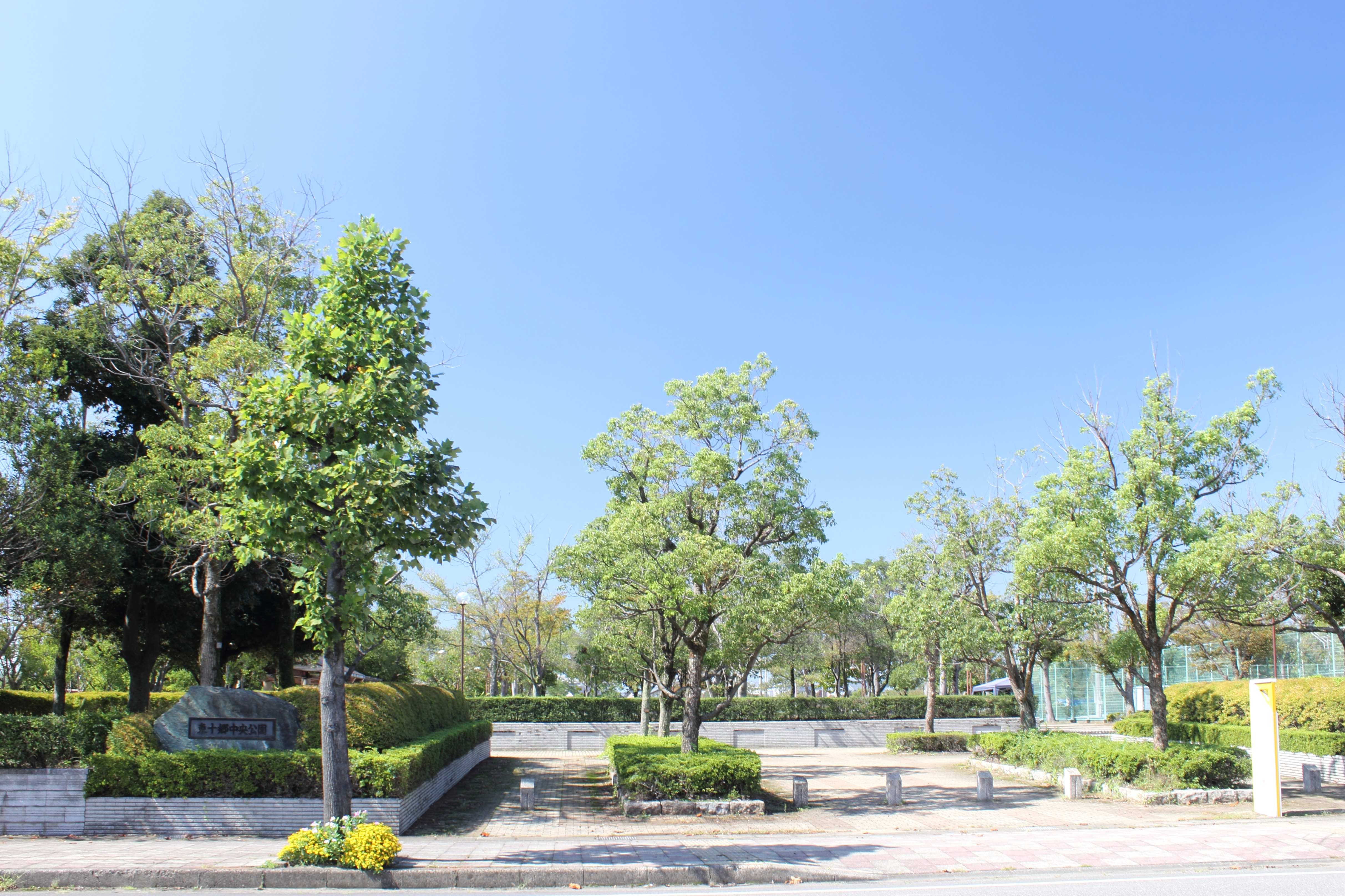 坂井市 東十郷中央公園